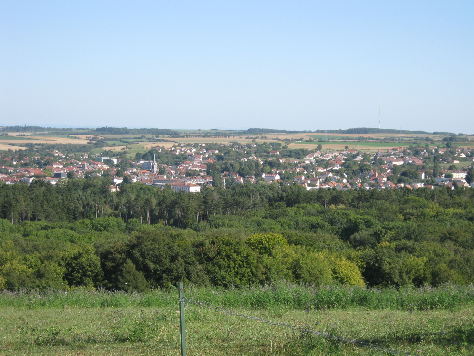 La ville de Vittel